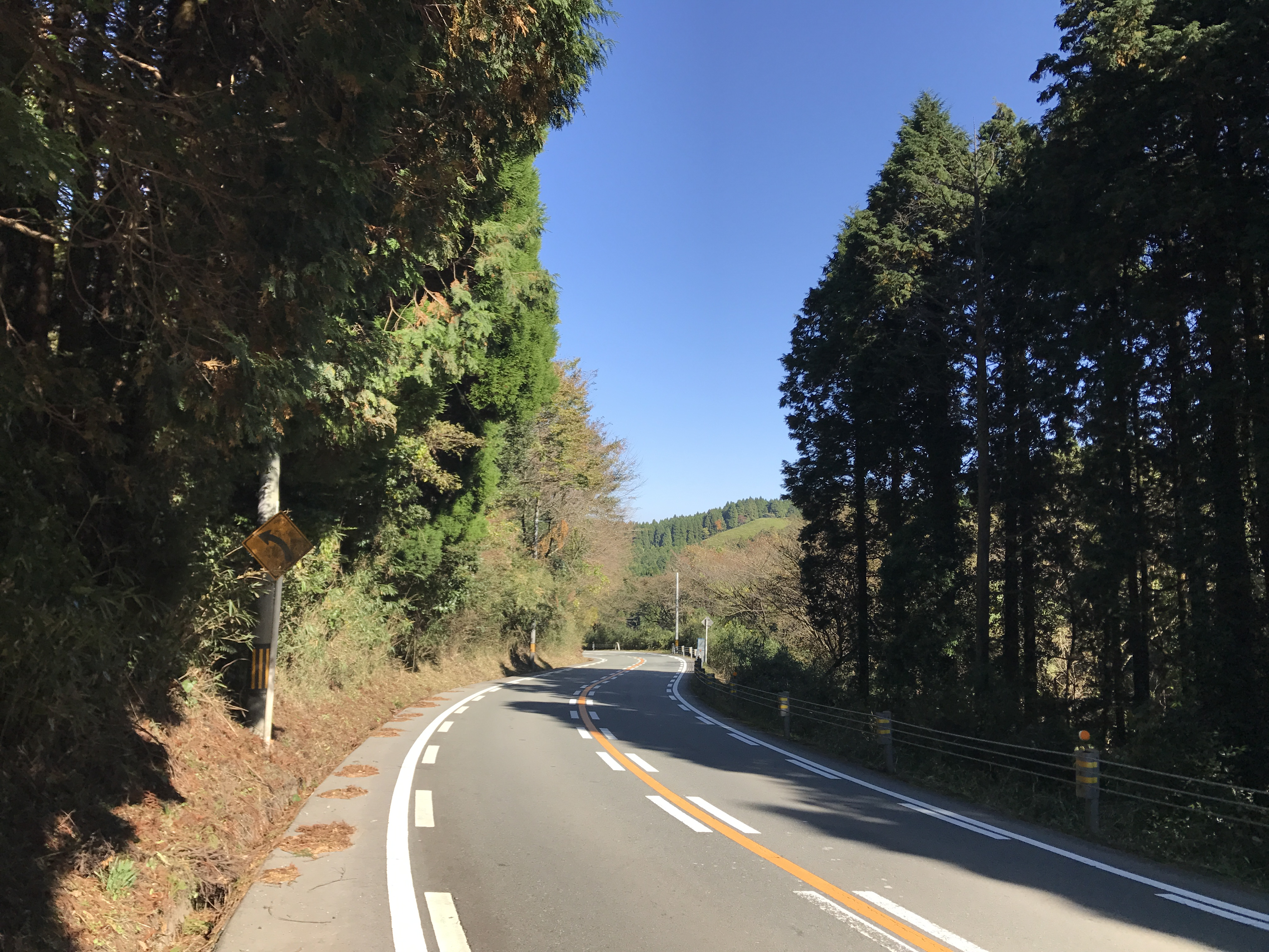 阿蘇ファームランド付近の阿蘇パノラマライン